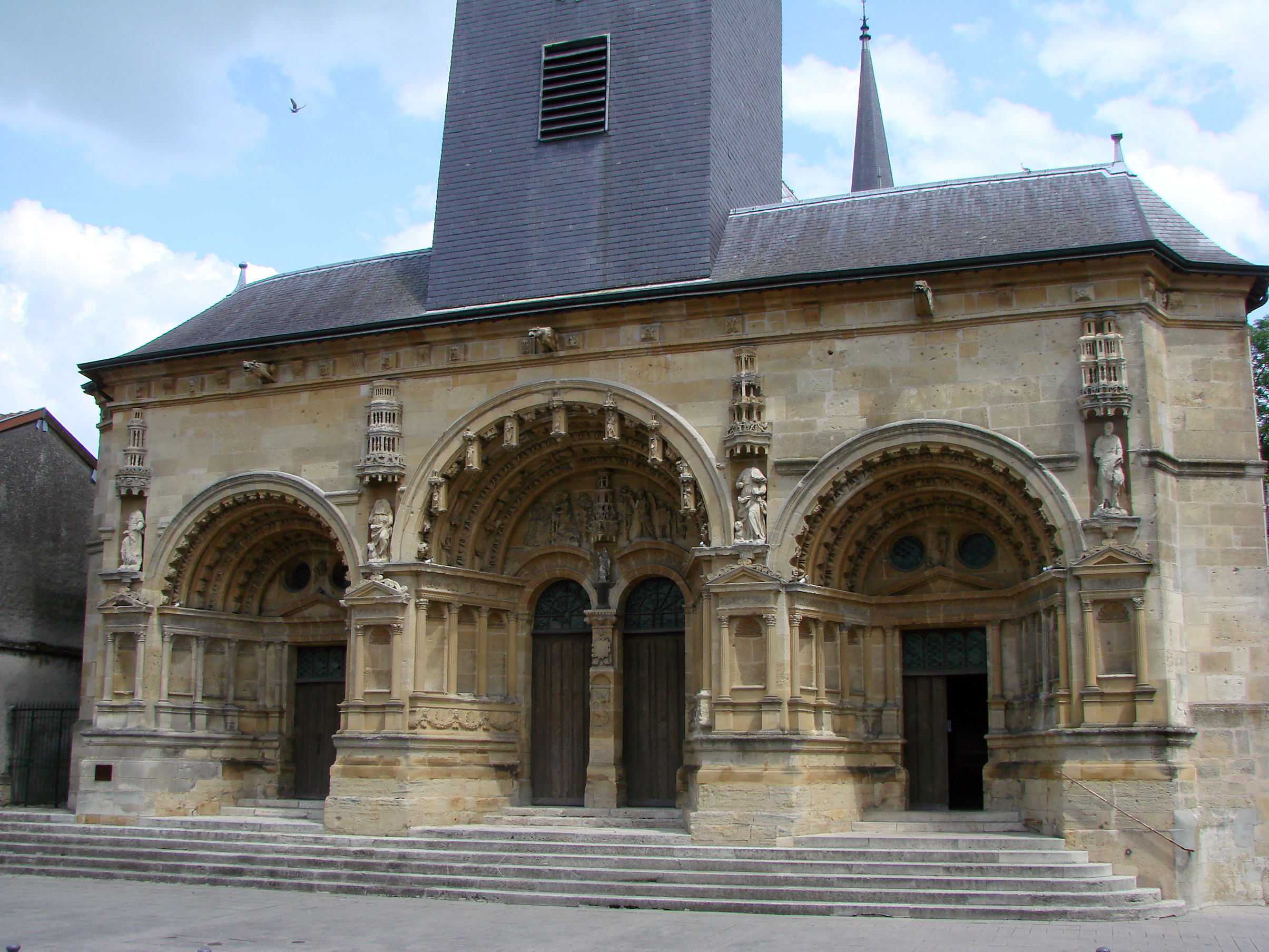 Eglise Saint-Maurille, Vouziers, Ardennes. Son portail Renaissance (milieu XVIème) est très particulier.